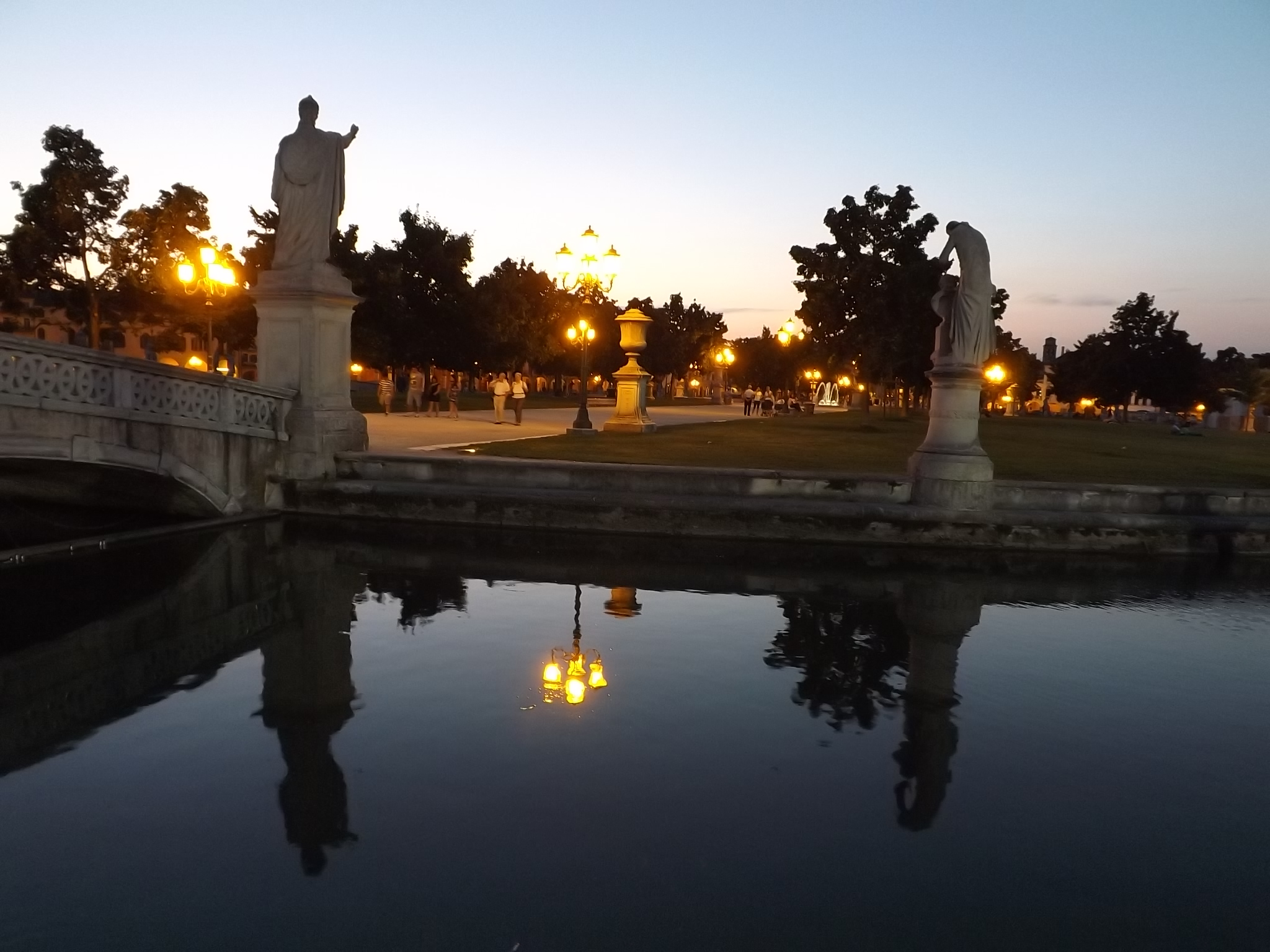 La seconda piazza d'Europa per estensione, il sabato ospita il mercato settimanale, ogni terza domenica del mese vi si svolge il Mercato dell'Antiquariato, nelle vicinanze si trovano la Basilica di S.Giustine e la Basilica di s.antonio